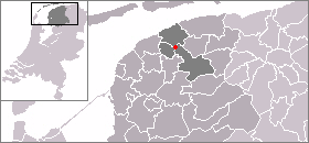 Kaart met de locatie van Bartlehiem, gemaakt uit sjabloon van Wikipedia-gebruiker Mtcv